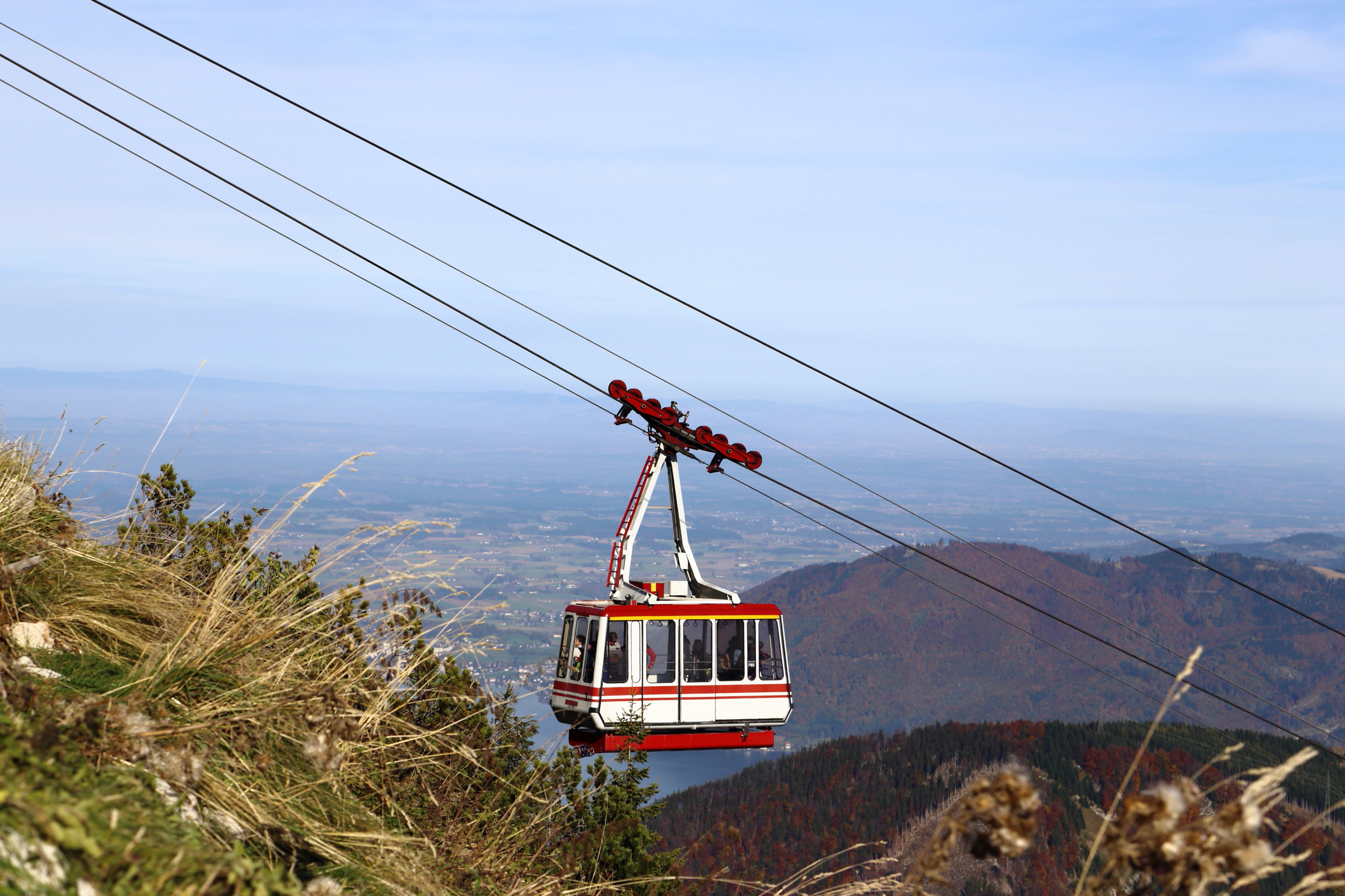 Gondel der Feuerkogelseilbahn kurz vor der Bergstation. Die Seilbahn wurde 1927 eröffnet und 1985 umfassend erneuert. Unter anderem können seitdem 37 Personen pro Gondel mit einer Geschwindigkeit von bis zu 12m/s befördert werden.